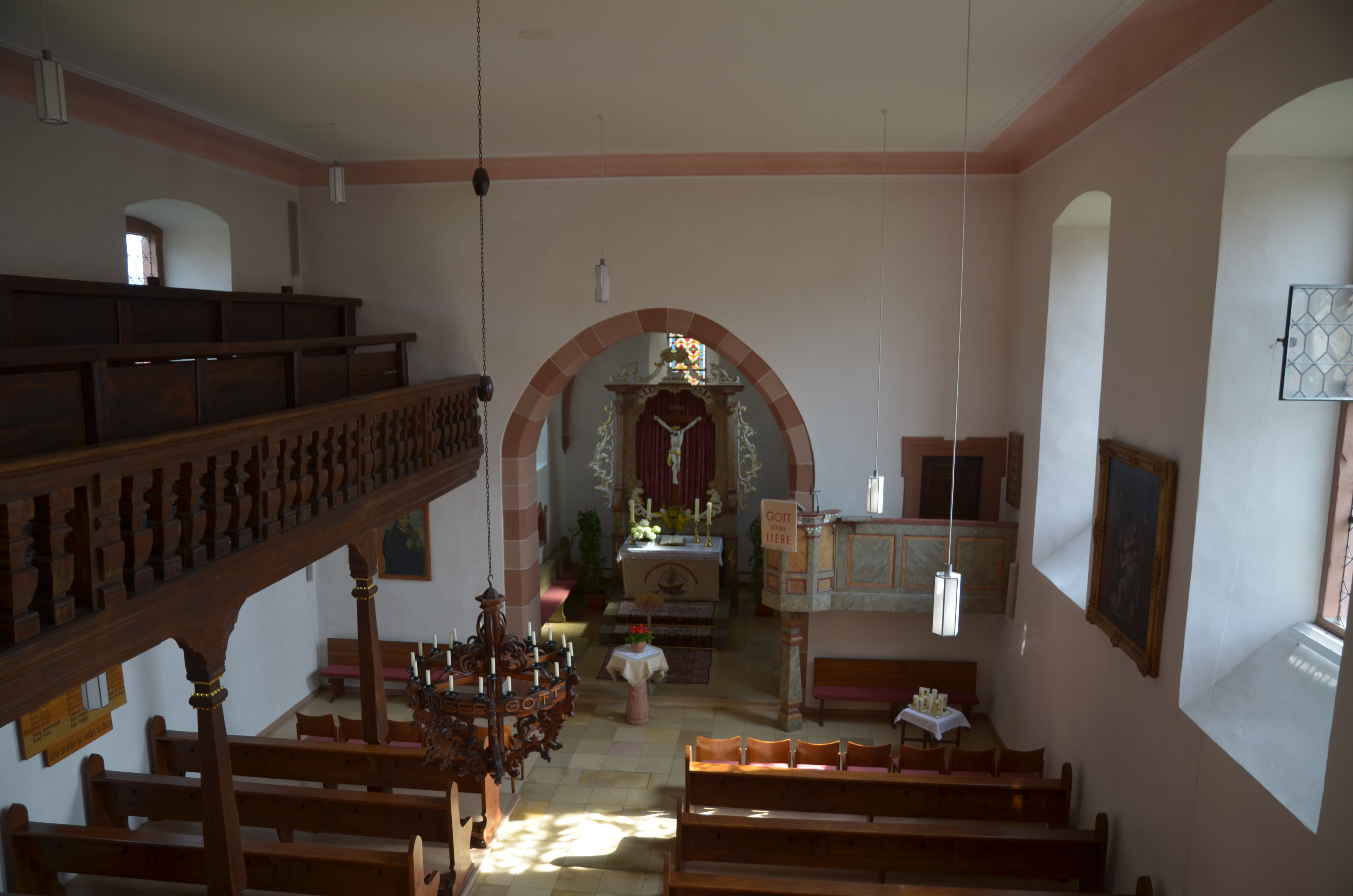 evang.-luth. Jakobuskirche in Mittelsinn